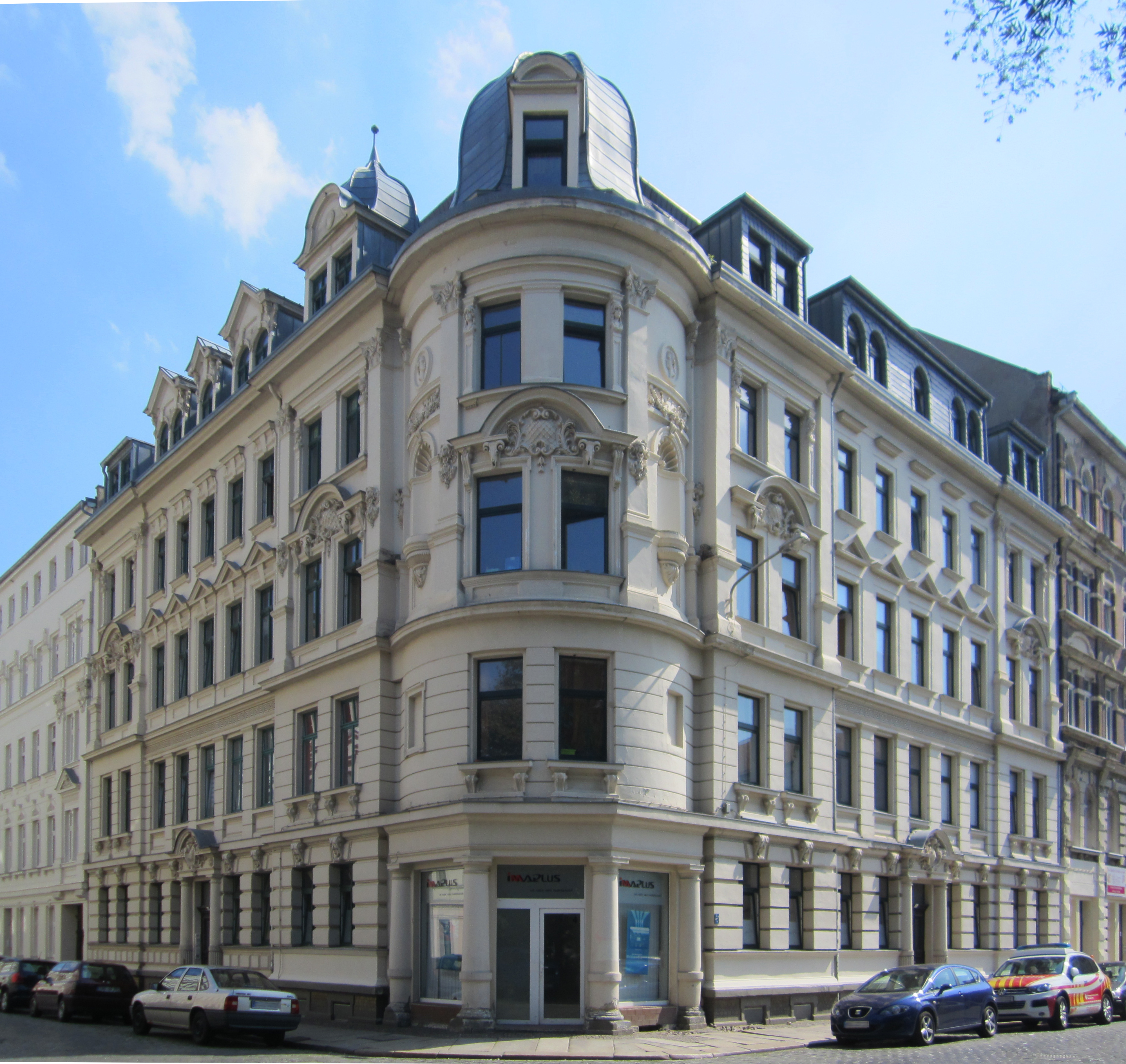 Koehlerstraße 4 in Leipzig; Denkmalbeschreibung: Doppelmietshaus in geschlossener Bebauung in Ecklage Kapellenstraße 6; mit Laden, Putzfassade, Stuck und Fußbodenkacheln im Eingangsbereich